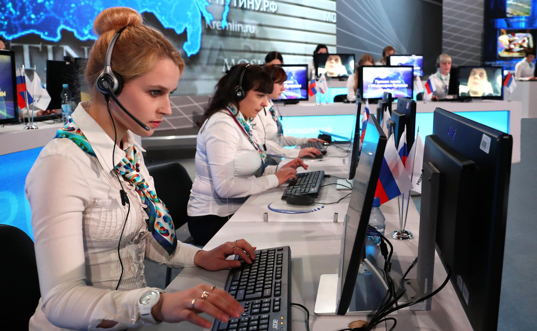 14-я Прямая линия с Президентом России Владимиром Путиным